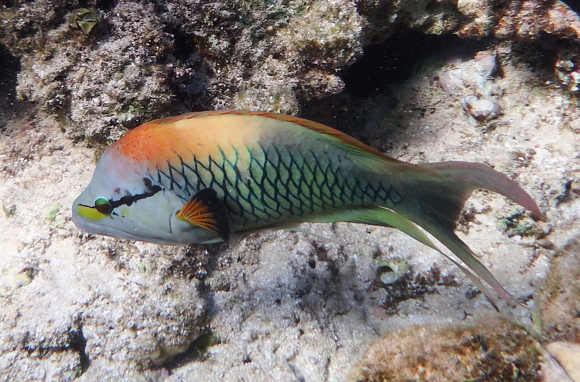 Fisch im Roten Meer. Epibulus insidiator. Slingjaw wrasse. Video hier